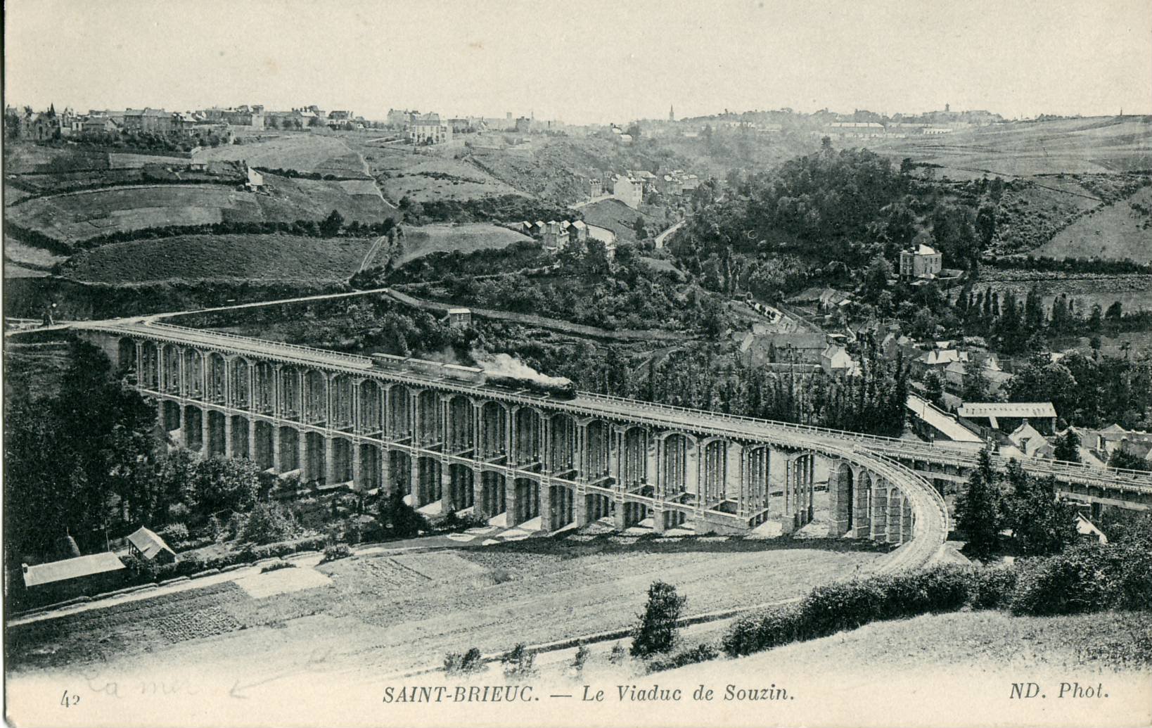 Carte postale ancienne éditée par ND, n°42SAINT-BRIEUC - Le Viaduc de Souzain